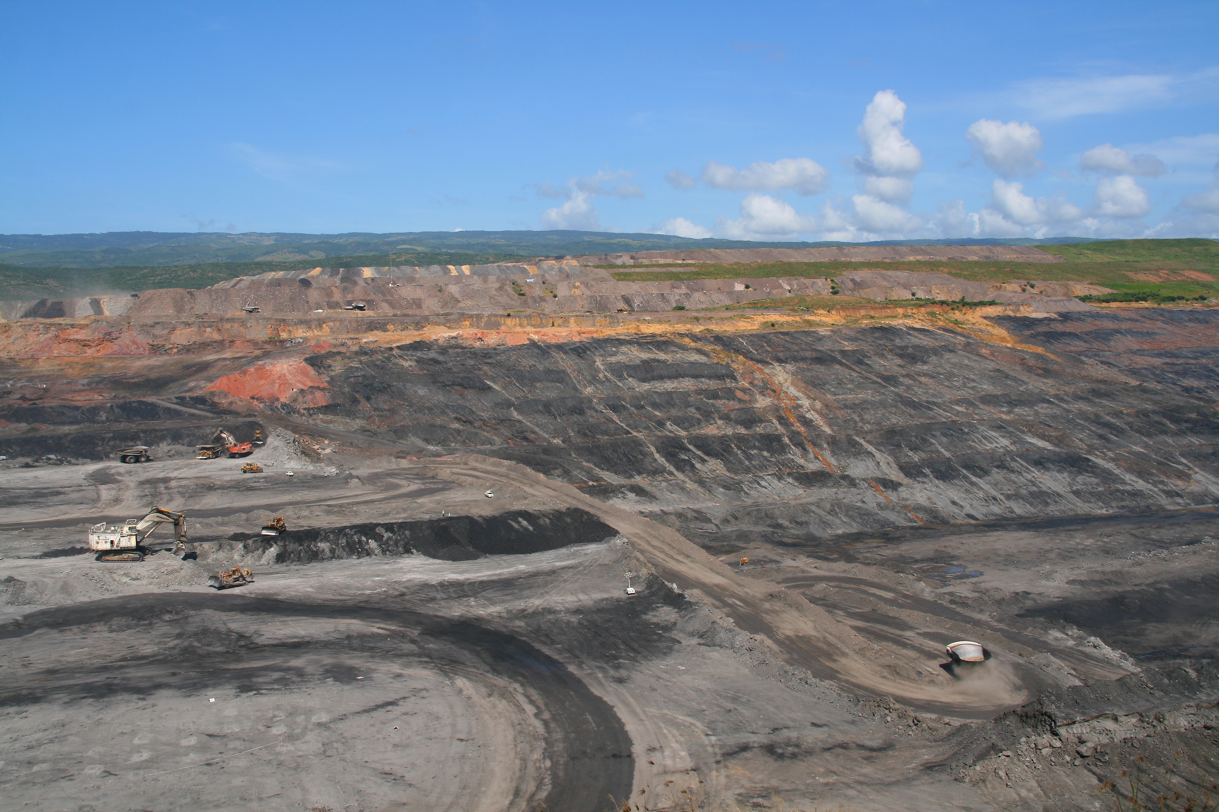 Coal mine, El Cerrejón